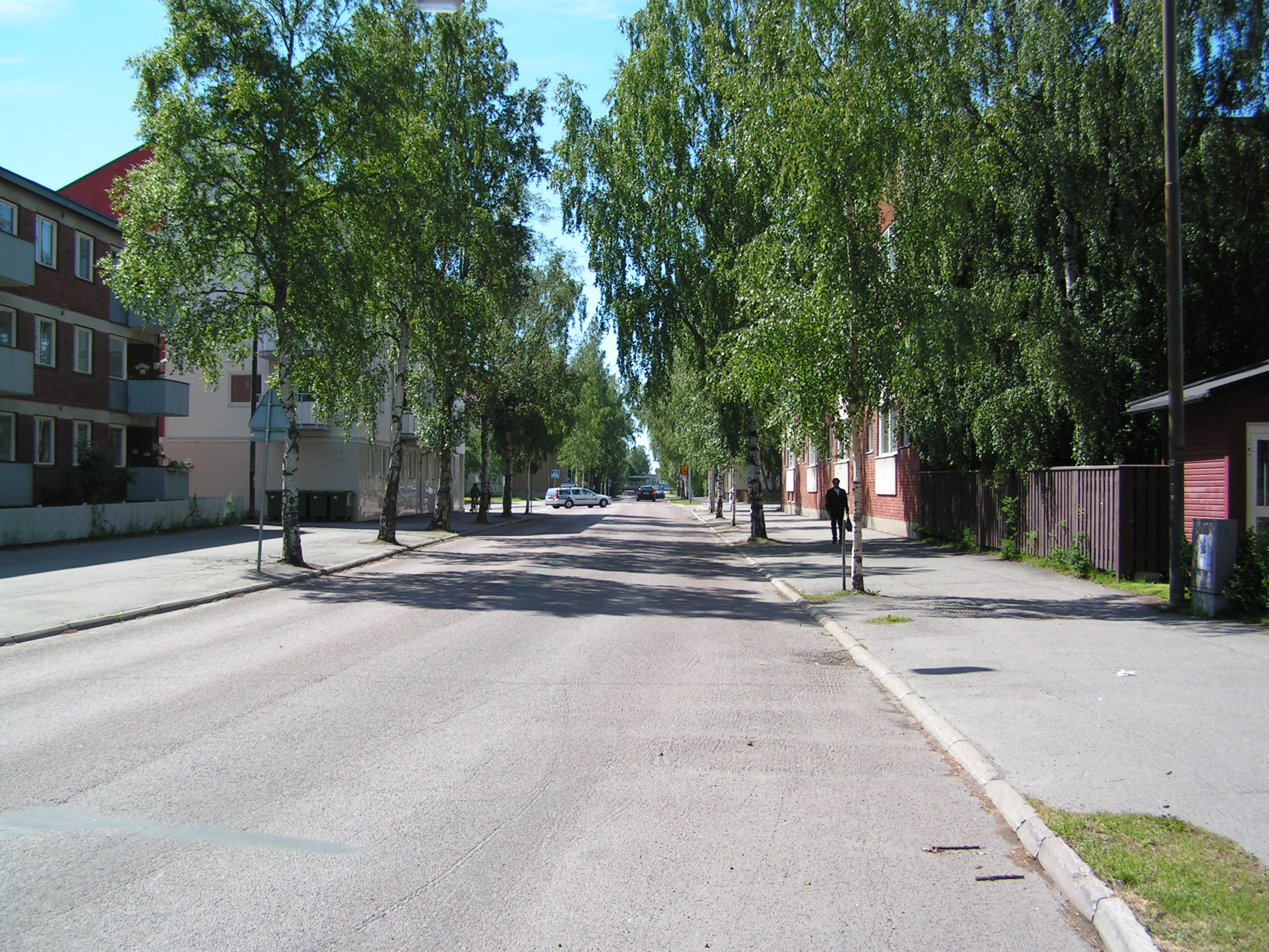 Östra Kyrkogatan, Umeå, Sweden